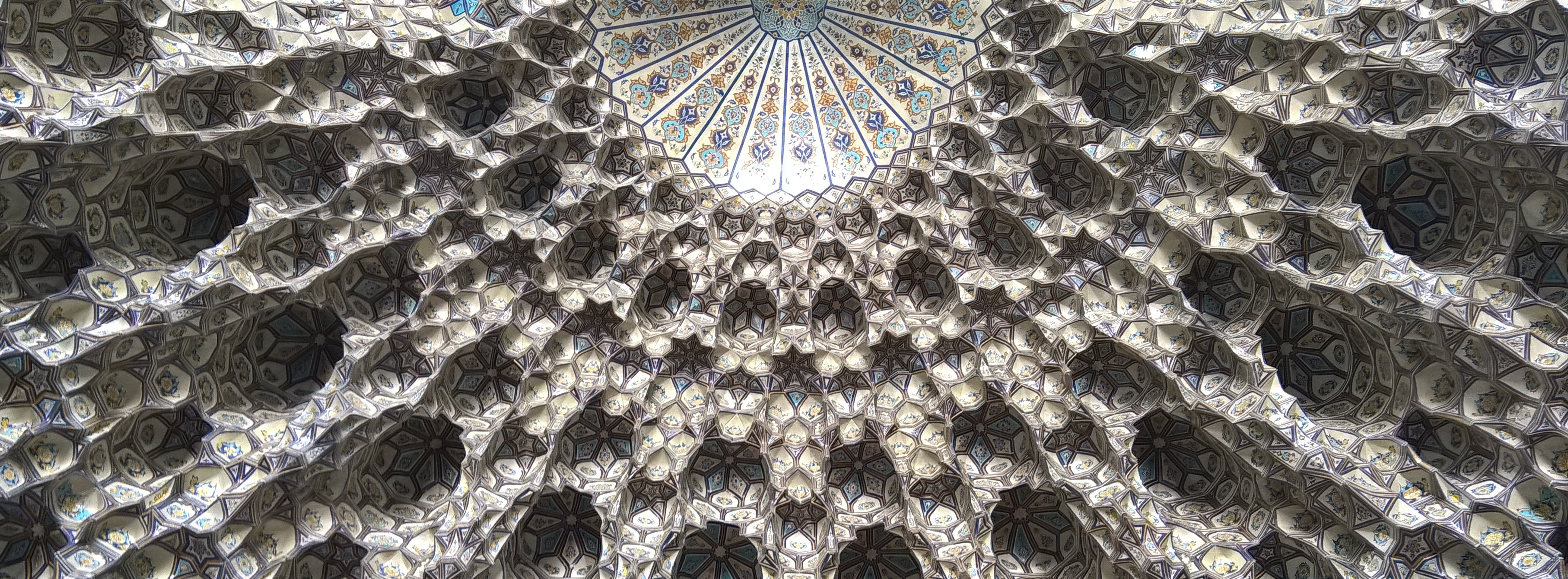 مجموعه حرم مطهر امام رضا (ع) - محراب مسجد گوهرشاد